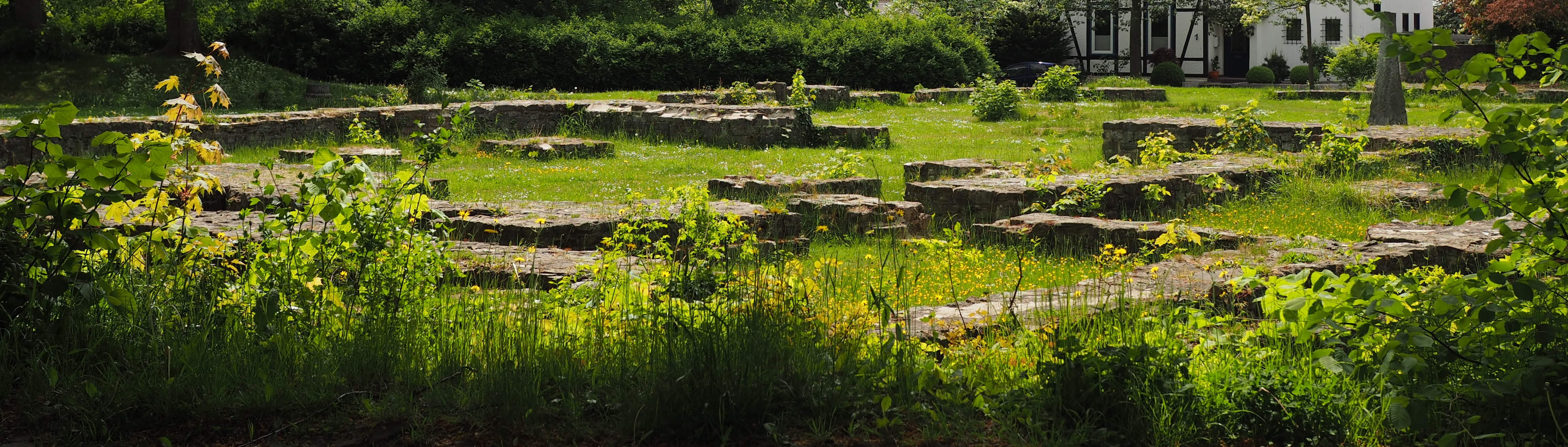 Goslar, Georgenberg, Grundmauern des Stifts